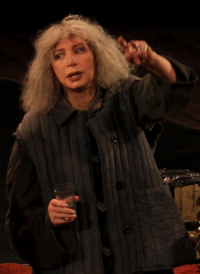 Татьяна Васильева в спектакле «Белла чао»!